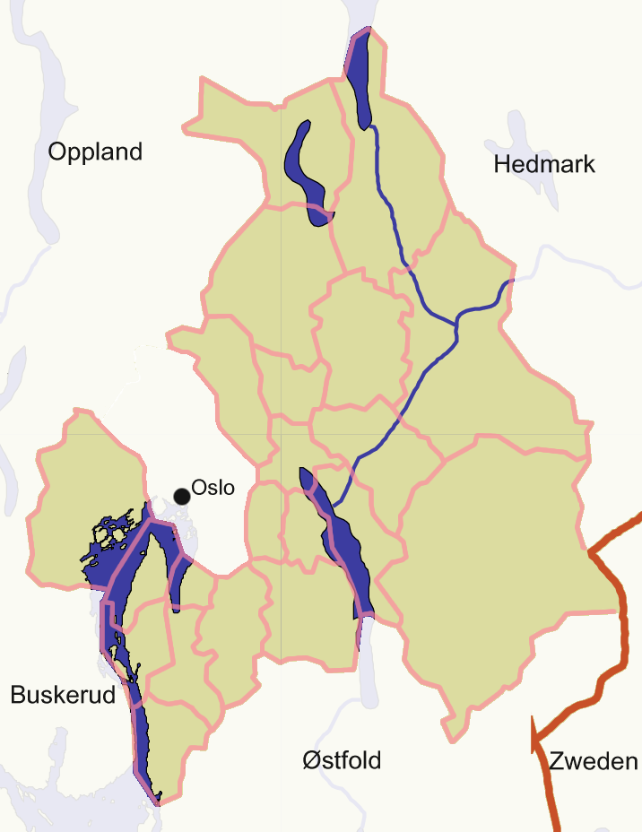 Kaart van de provincie Akershus gemaakt door Danielm. Met het programma GMT is een kustlijnenkaart gegenereert welke als basis is gebruikt. Met behulp van Gimp zijn de gemeentegrenzen erop getekent waar op basis hiervan verdere bewerkingen zijn uitgevoerd, zoals het vervagen van de omliggende gebieden.